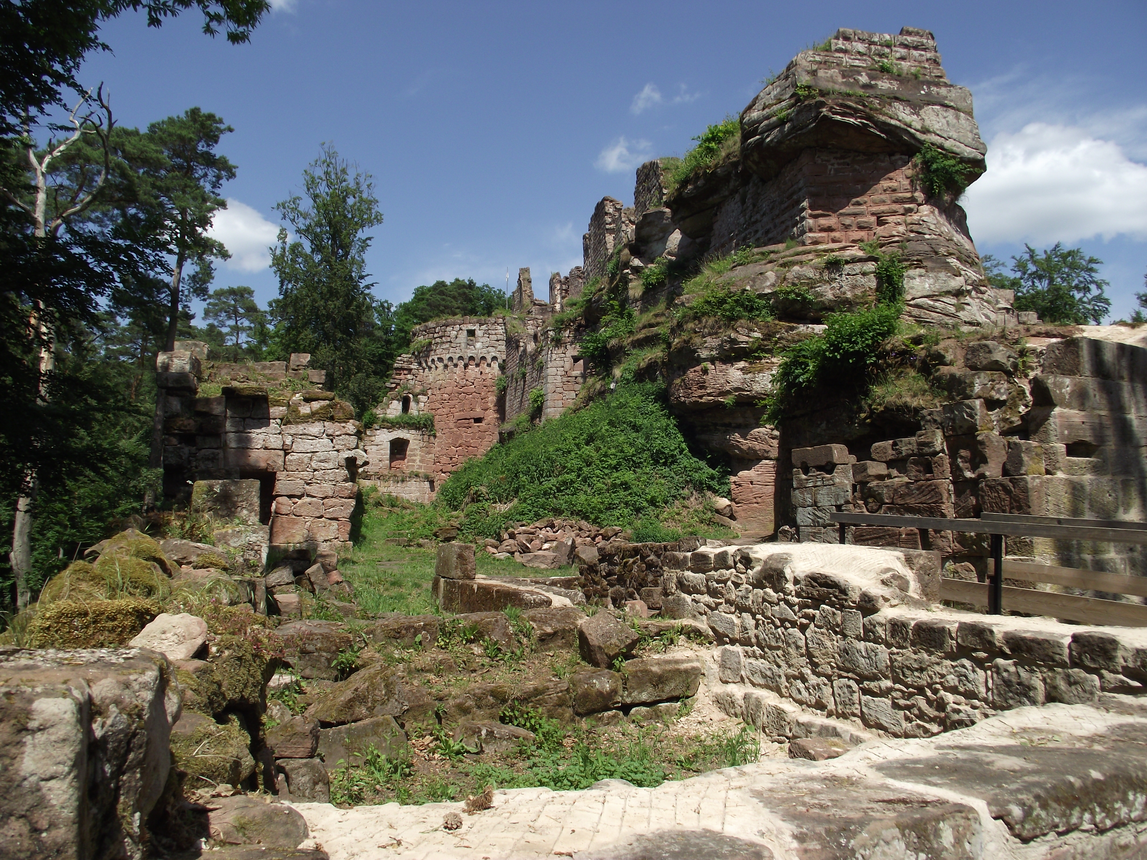 Les ruines du château de Schoeneck dans les Vosges du Nord.